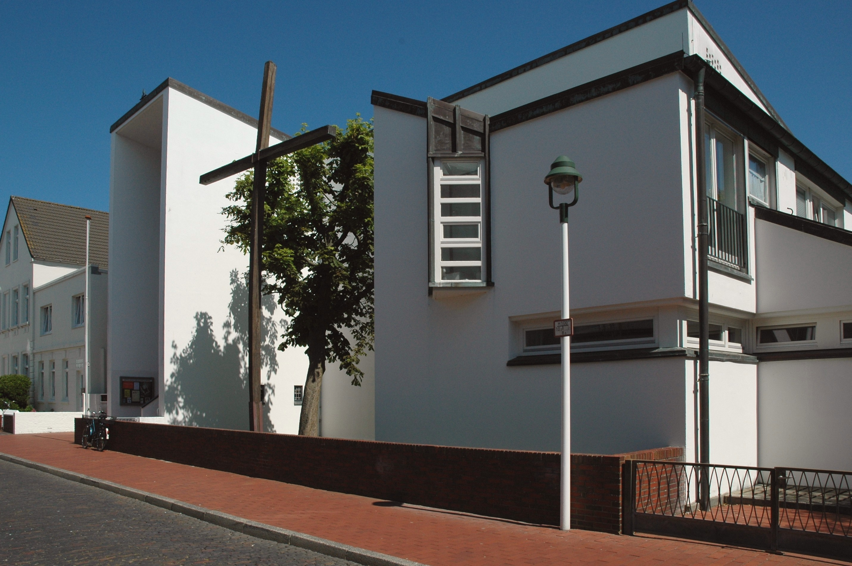 Stella Maris Norderney Außenansicht der katholischen Kirche Stella Maris auf Norderney